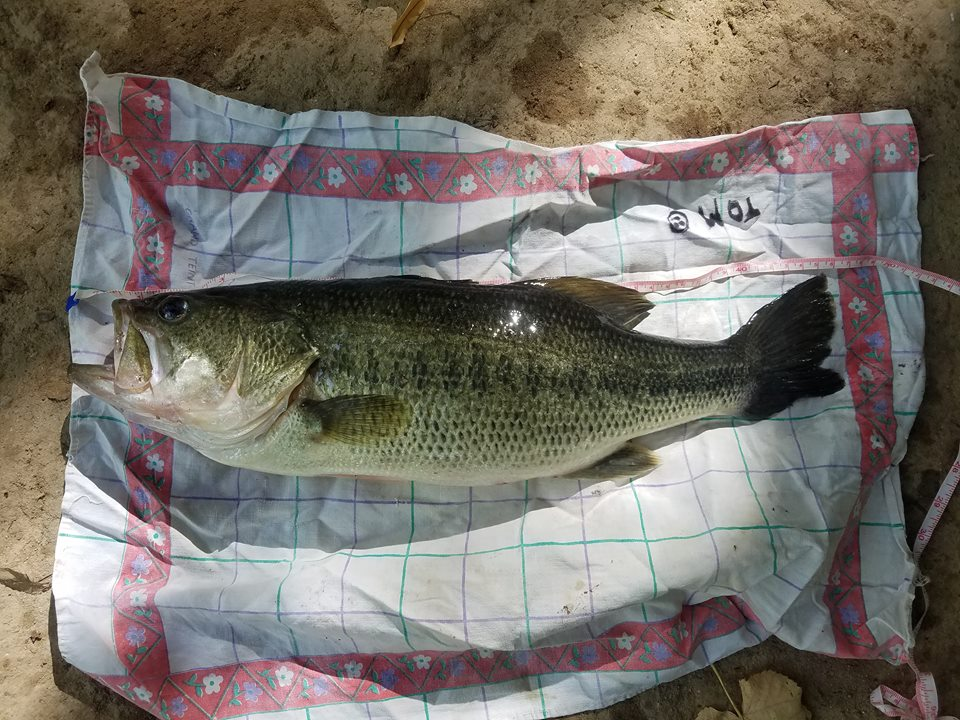 Poisson de 47 cm, Lez (34), 2018, femelle